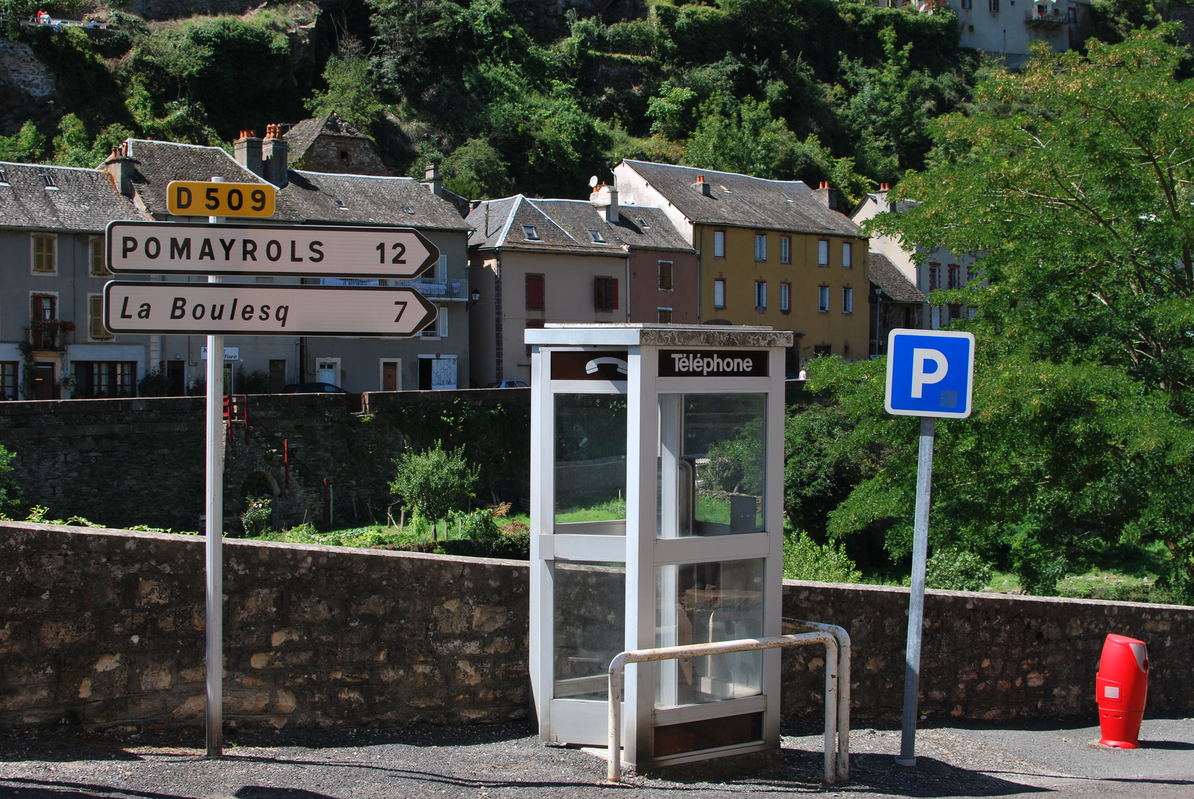 Saint-Laurent d'Olt